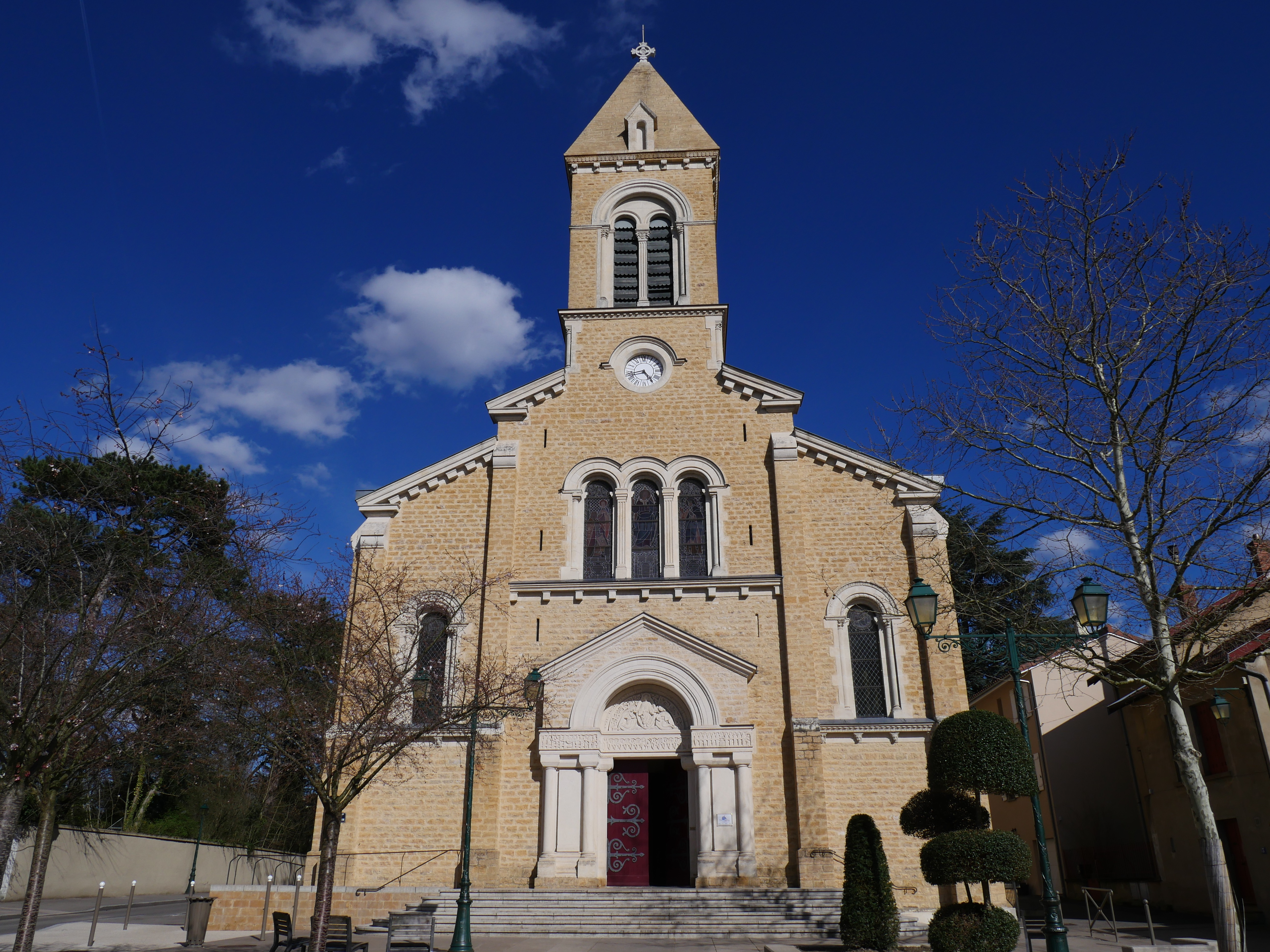 Eglise de Tassin, faite par Pierre Bossan